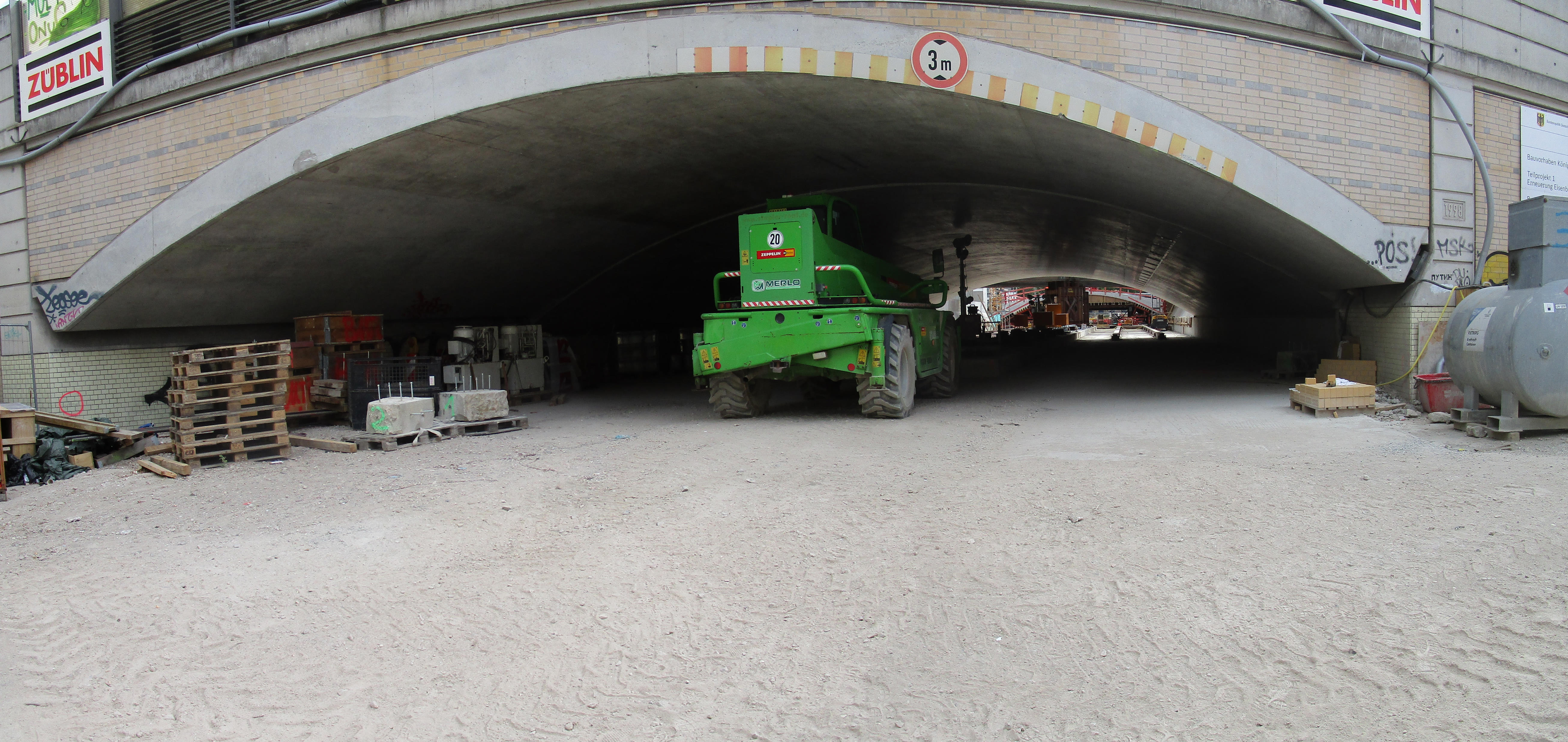 Die Eisenbahnüberführung über die Königstraße (Hannover) wurde in den Jahren 2018 bis 2020 erneuert ...Zustand am 2. Juli 2019 auf der Ostseite der Brücke, deren östlicher Teil schon erneuert worden war. Narrenhände hatten schon gewirkt. Putins Name war schon – natürlich auf der Ostseite der Brücke! – mit Schablone auf die neue Mauer geschrieben worden: Путин = Putin.